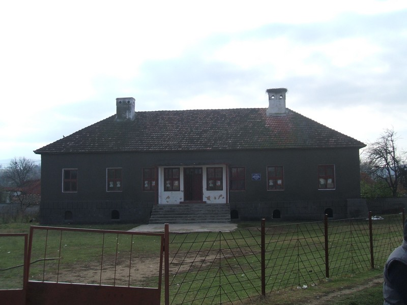 Amplasat în centrul satului, la arterele principale ce unesc răscrucea satului, căminul cultural este un monument istoric ce dateaza încă din anii 1800 , rezistând trecerii timpului și marcând centrul de interes din satul Duleu.